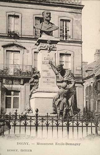 Isigny-sur-Mer, département du Calvados, sur une carte postale de la fin du 19e ou du début du 20e siècle. Monument en bronze à Émile Demagny, sculpté par Léopold Bernstamm sur la place Gambetta, devenue place du Général-de-Gaulle. Il est inauguré en 1922. Il est fondu sous le régime de Vichy, dans le cadre de la mobilisation des métaux non ferreux.